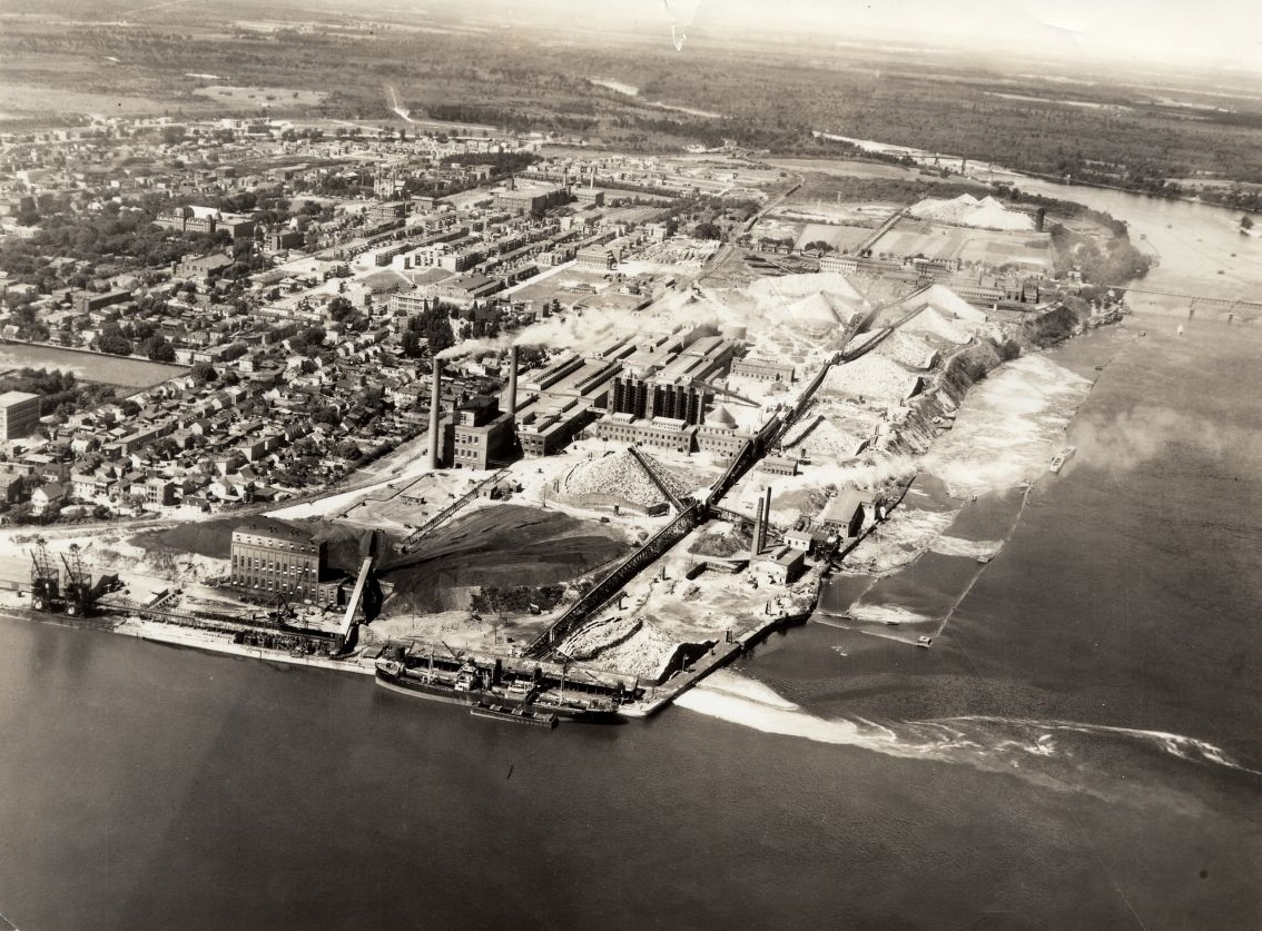 Vue aérienne de la Canadian International Paper à Trois-Rivières vers 1930. Centre interuniversitaire d’études québécoises, Collection René-Hardy, Fonds Trois-Rivières, Série Trois-Rivières Illustré